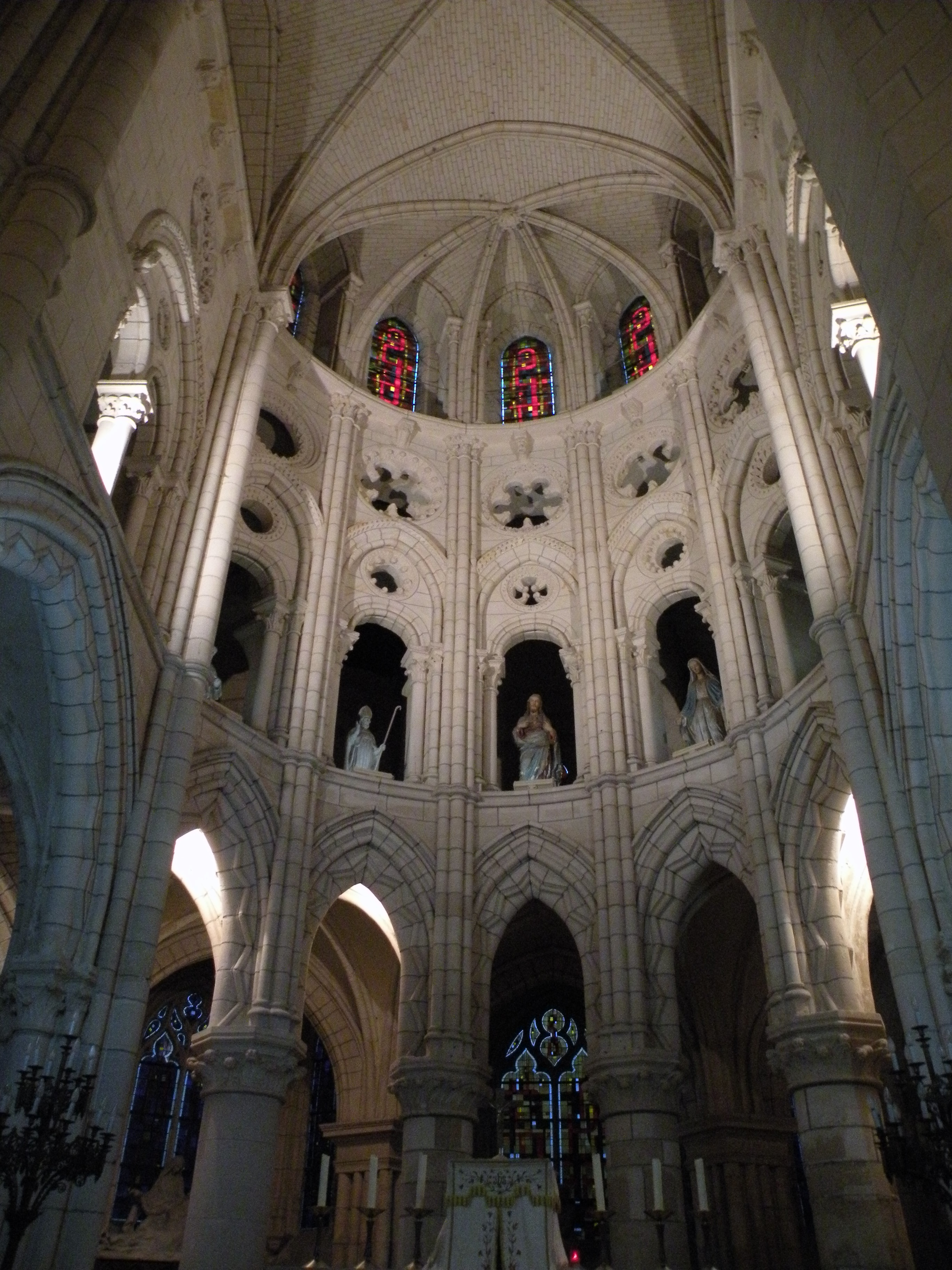 coeur